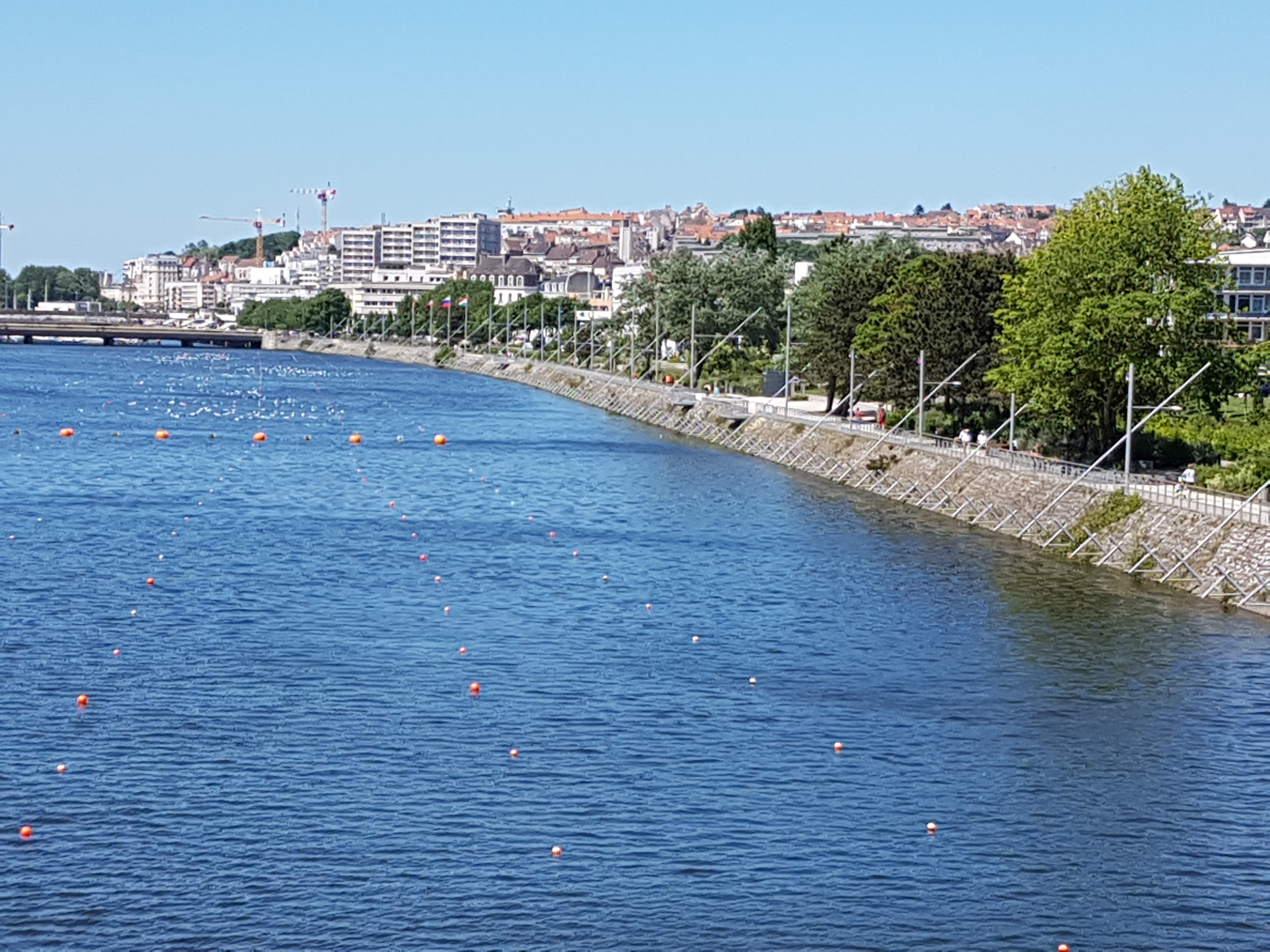 La Liane à Boulogne-sur-Mer (Pas-de-Calais)